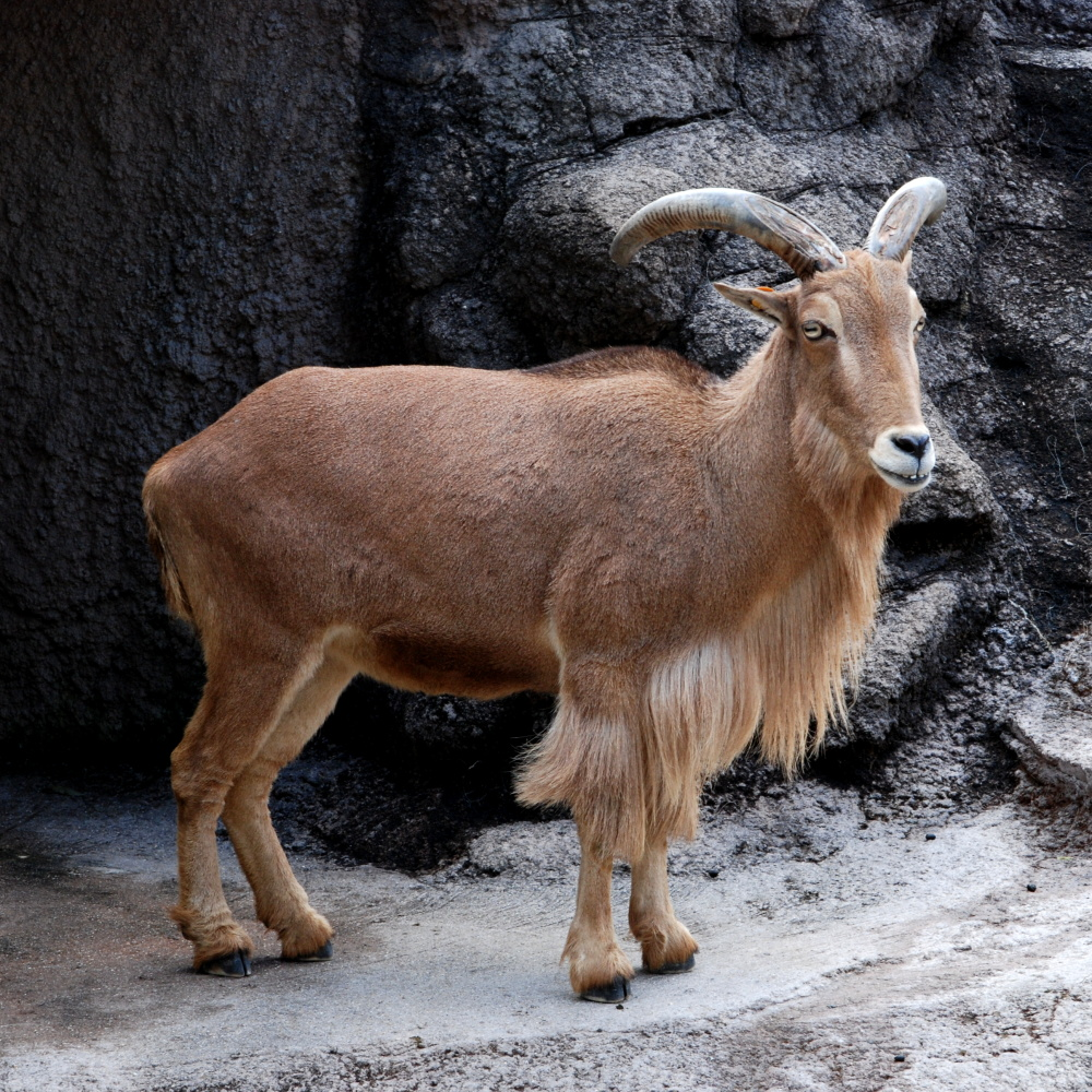 天王寺動物園のバーバリシープ。